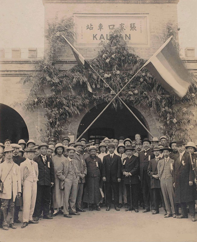 1912年9月6日，孙中山由北京乘坐专列赴张家口视察京张铁路，7日十时抵达张家口。图为孙中山与欢迎人员在张家口车站的合影。前排右3叶恭绰、右5梁如浩、右6孙中山、右7梁士诒、右8朱启钤。照片由北京同生照相馆拍摄。